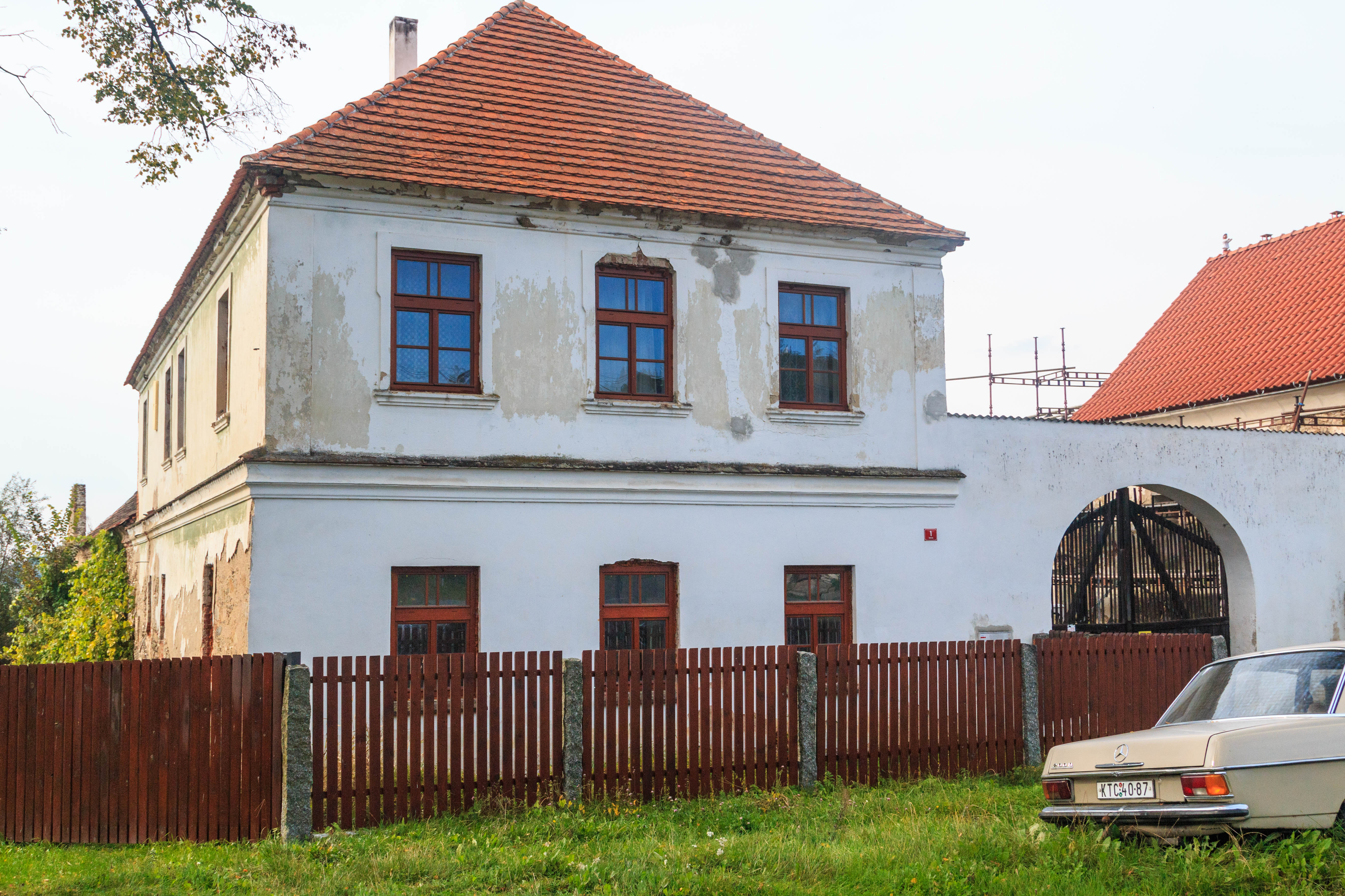 Únice - čp. 1